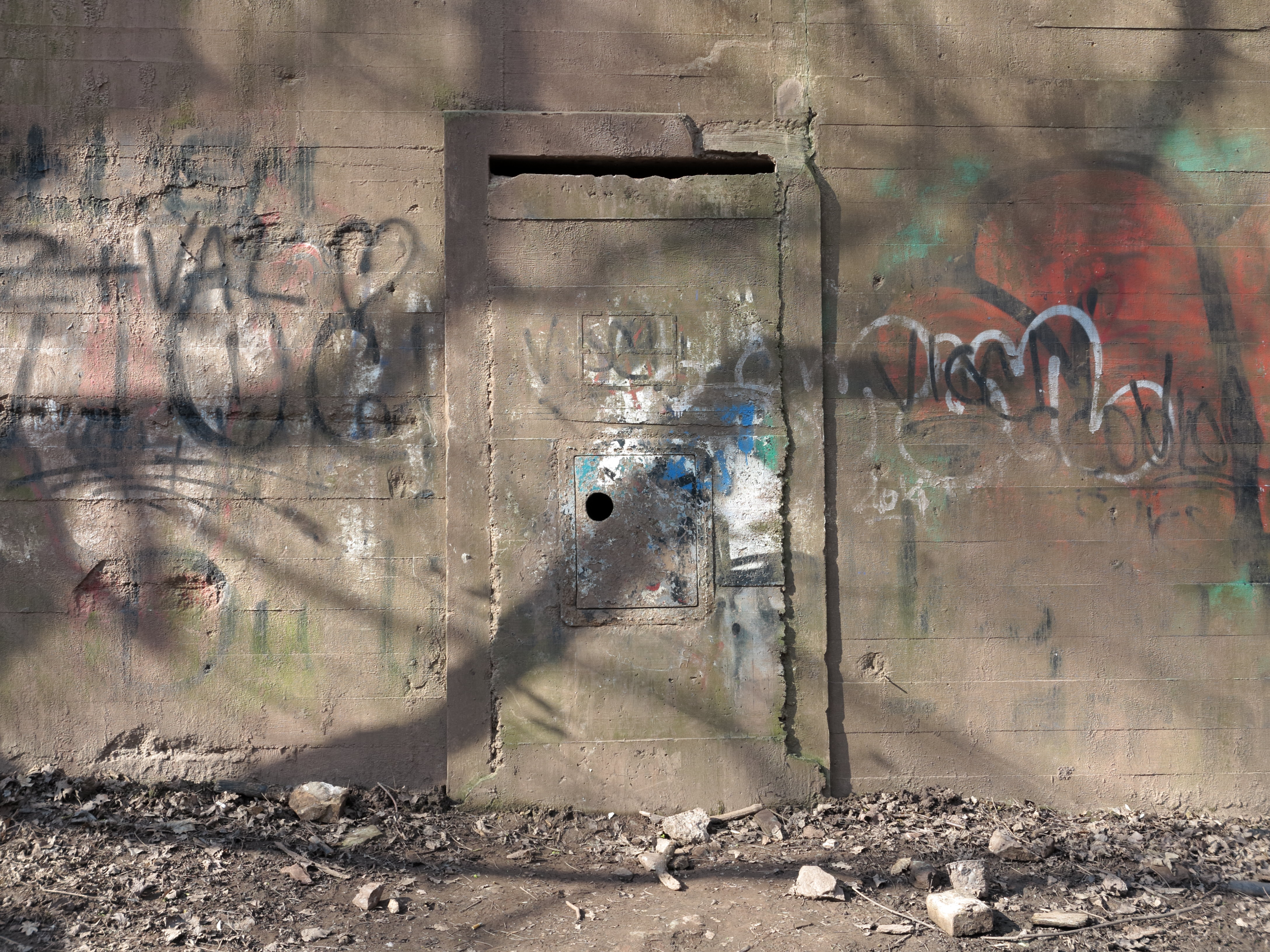 Der versiegelte Eingang zum ehemaligen Bunker des Kreisbefehlsstandes auf dem Braunschweiger Nußberg.